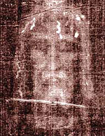 Спас Отпечаток лика Христа на Туринской плащанице